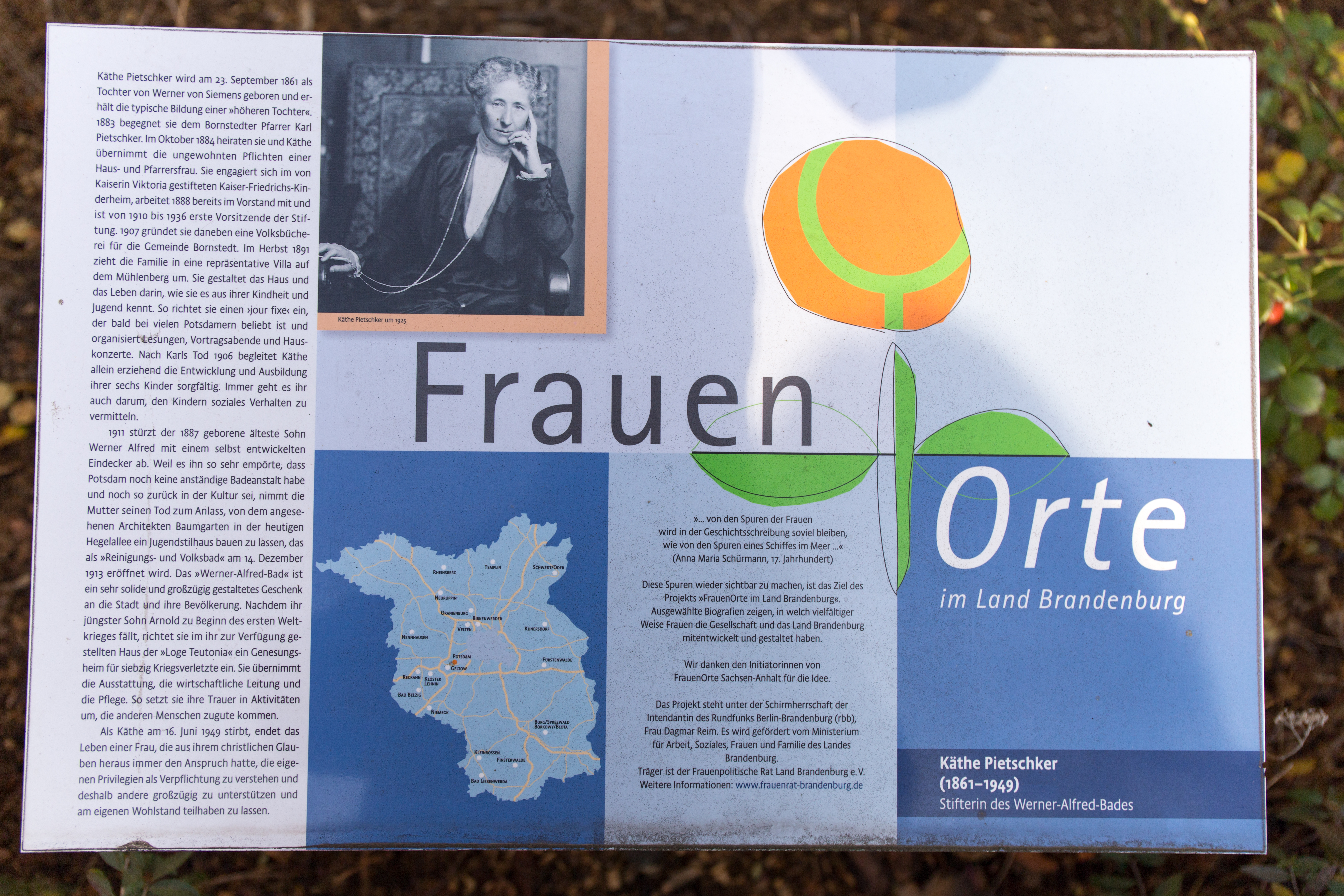 Führung durch Potsdam anläßlich von Hundert Jahre Frauenwahlrecht.